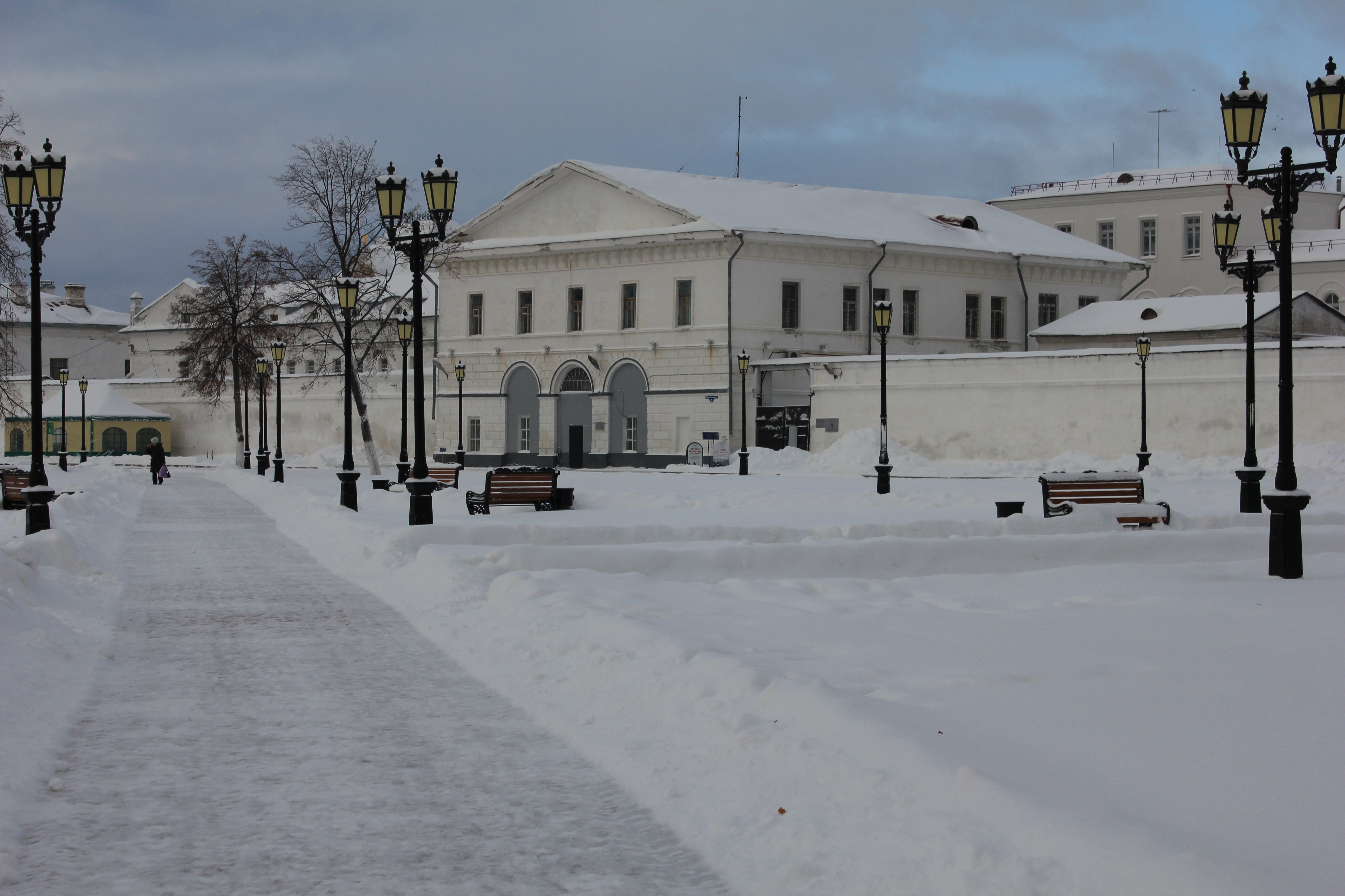 Тюремный замок (Тюменская область, Тобольск, Красная площадь, 4)